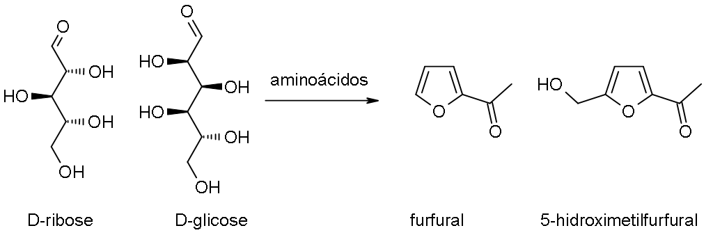 produtos da reação de Maillard